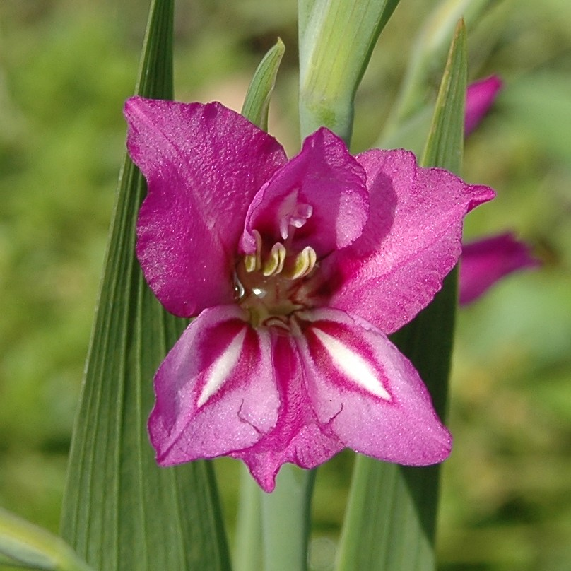 Gladiolus imbricatus in Västerås Botanical garden